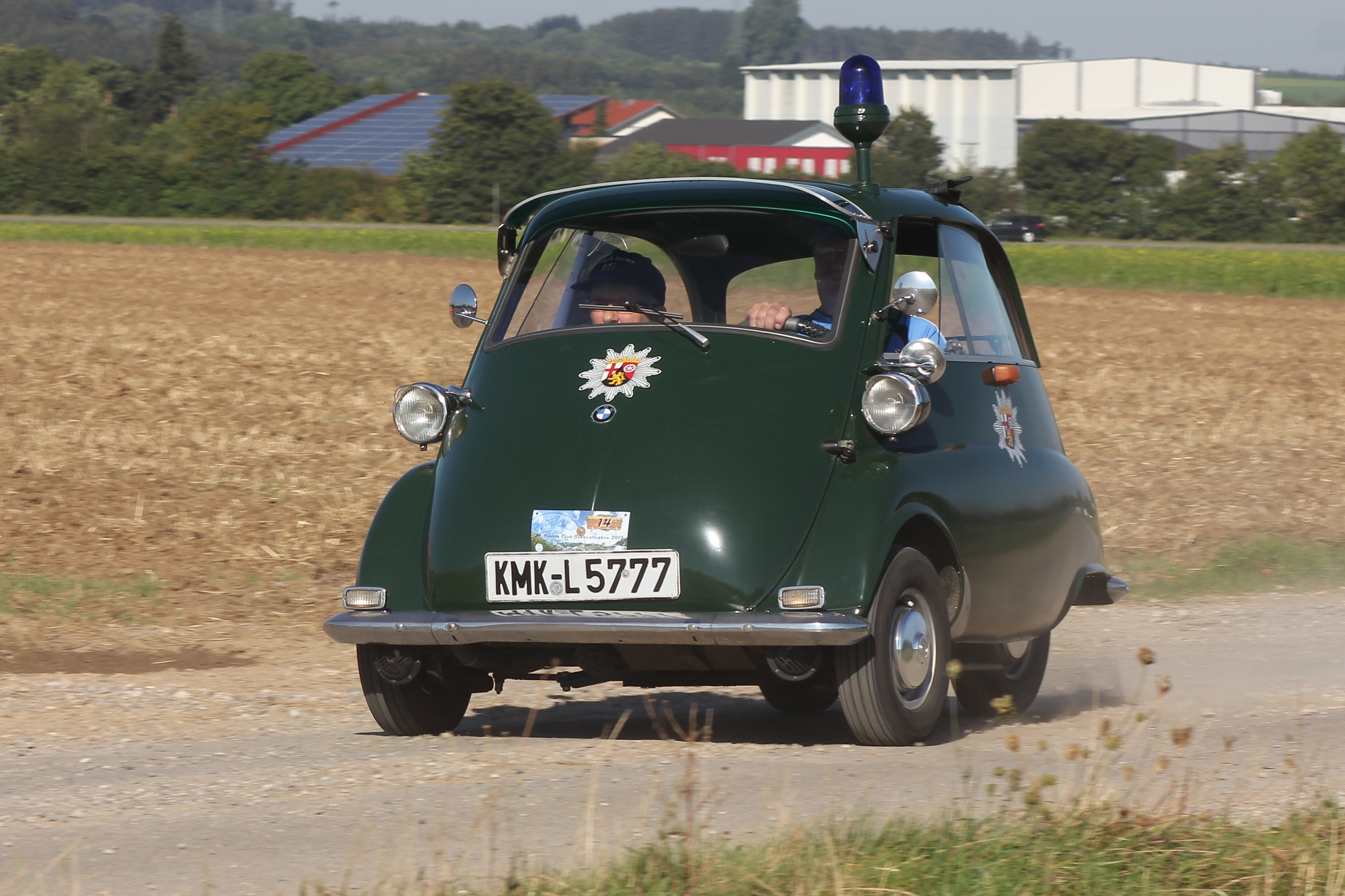 BMW Isetta 300, Baujahr 1957, beim Isetta-Treffen in Bad Wörishofen. Bis 1968 war diese Isetta zunächst in Köln und später in Bergisch-Gladbach als Dienstfahrzeug der Polizei im Einsatz. Danach gelangte sie in Privatbesitz und wurde umlackiert, bevor sie der heutige Eigentümer 1989 kaufte und in ihren ursprünglichen Zustand einschließlich Blaulicht zurückversetzte. (Kennzeichen des Fahrzeugs verändert)